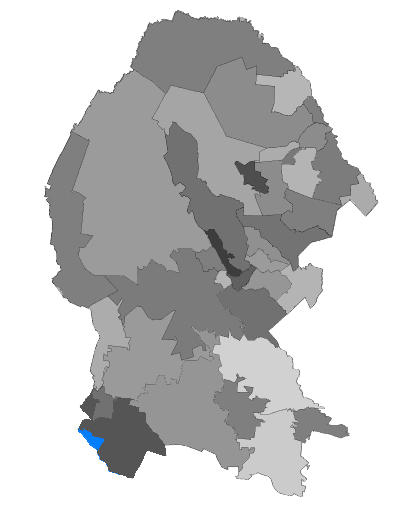 Distrito 5 Federal en Coahuila